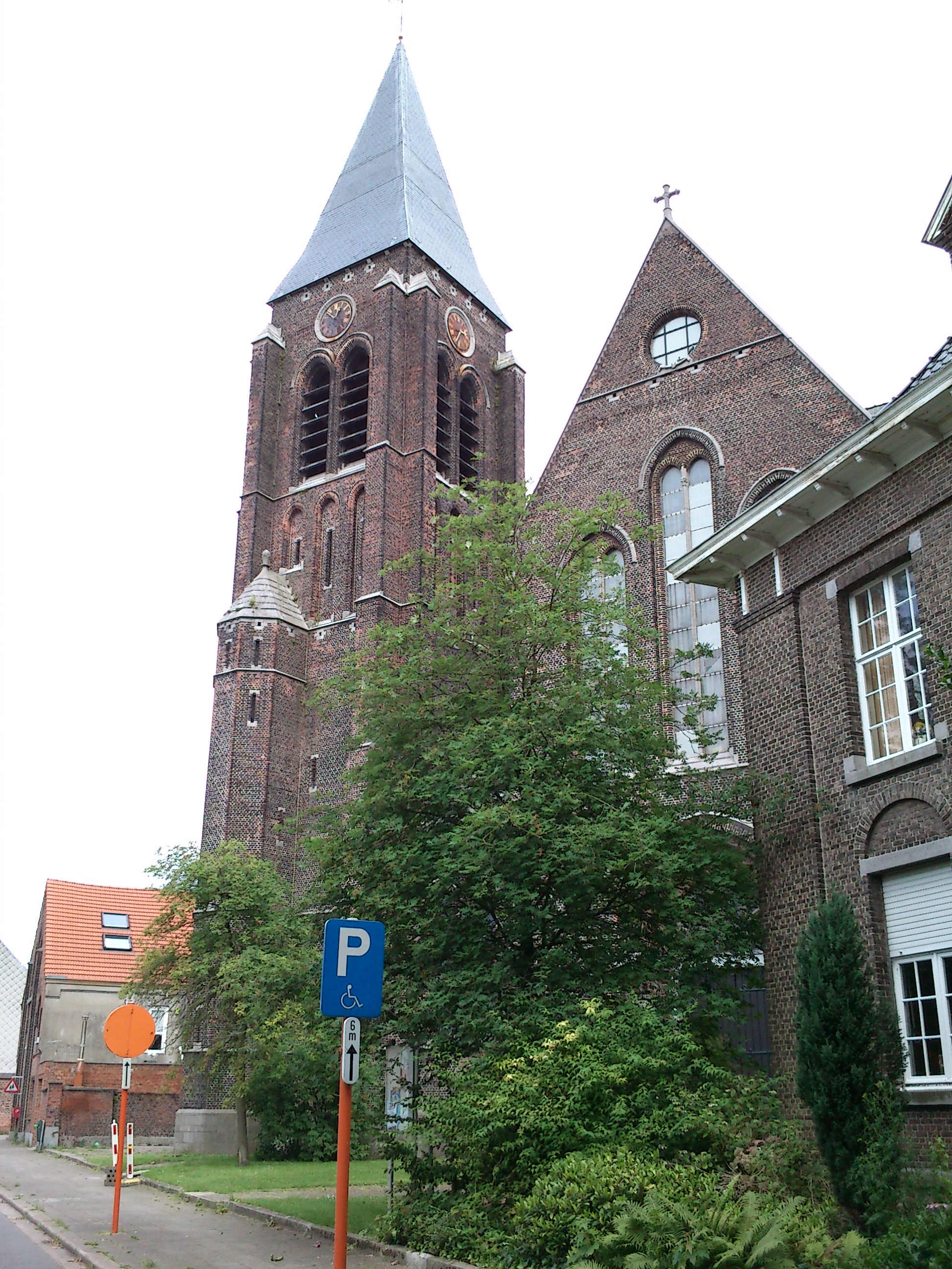 De Sint Jozef kerk in het Nielse gehucht Hellegat, België. Unknown